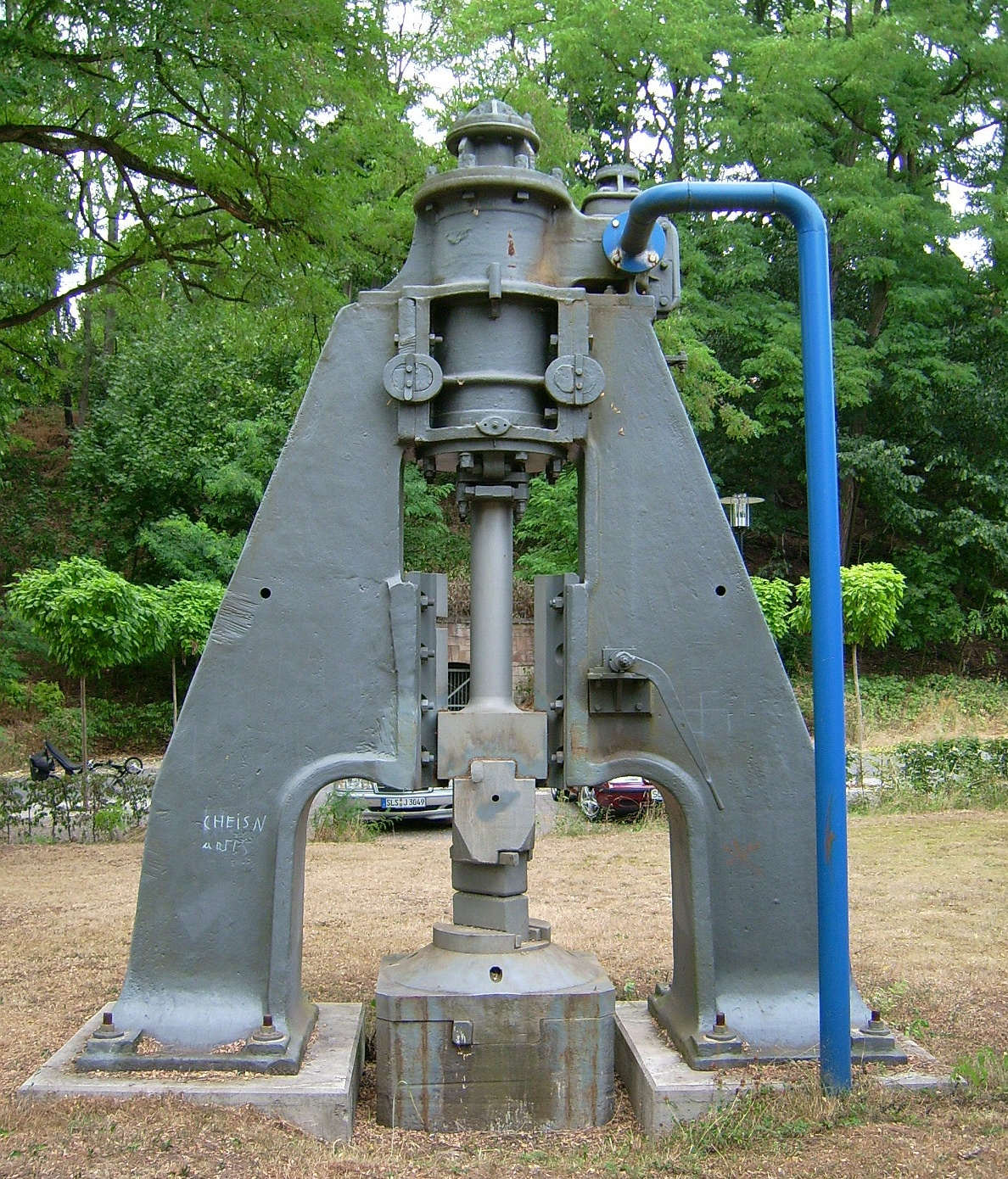 Dampfhammer in Ensdorf Saar